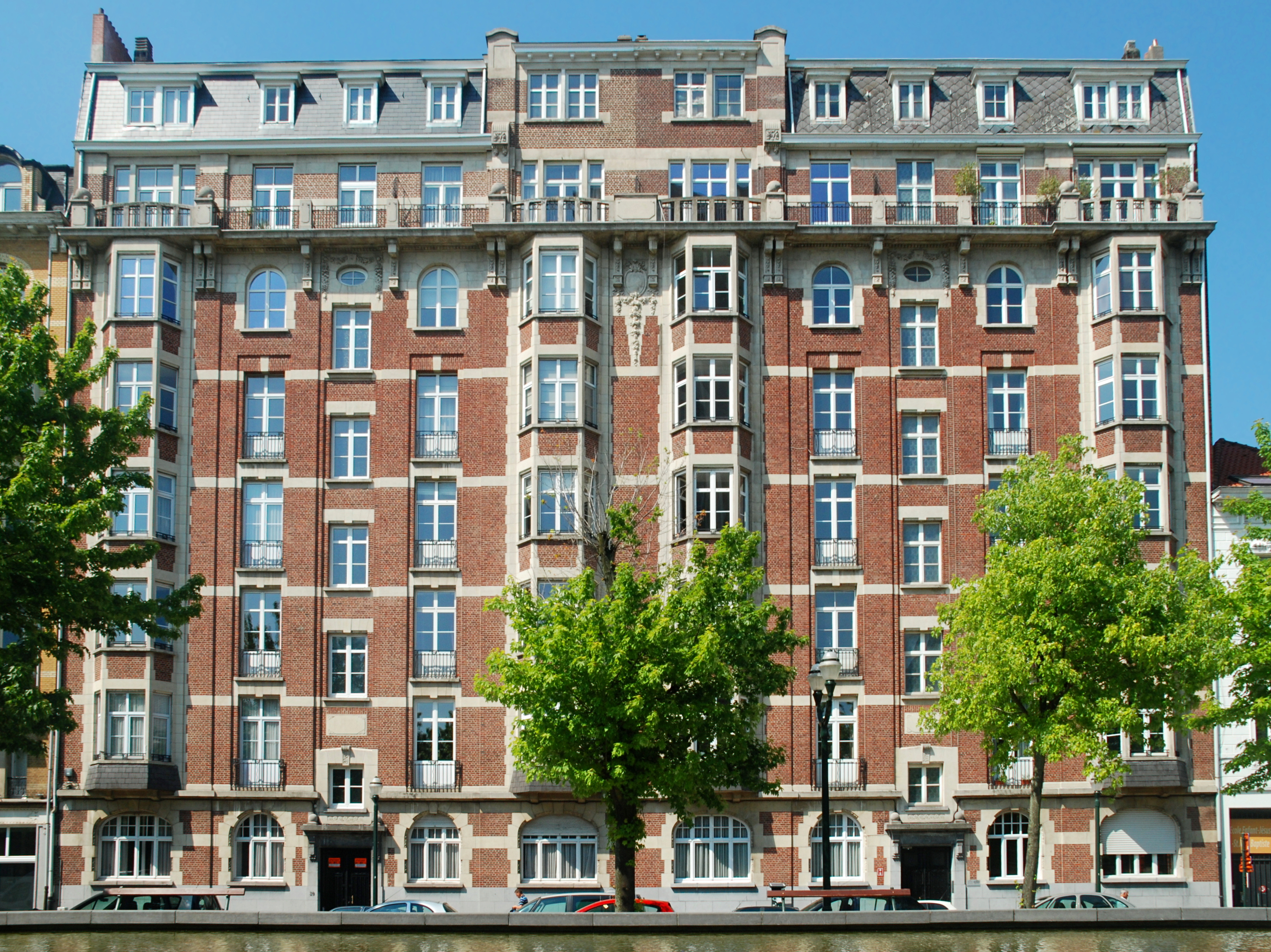 Belgique - Bruxelles - Quai au Foin 29 - architecte JB Tilman - Style Beaux-Arts